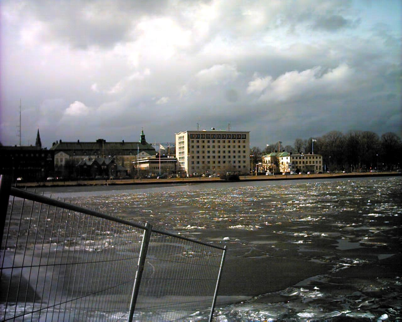 Centrala Jönköping. Länsstyrelsen på andra sidan Munksjöns is. Photo taken by User:Boivie in Jönköping 7 April 2006